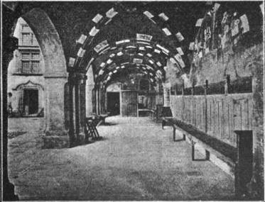 Interno del porticato del castello di Issogne